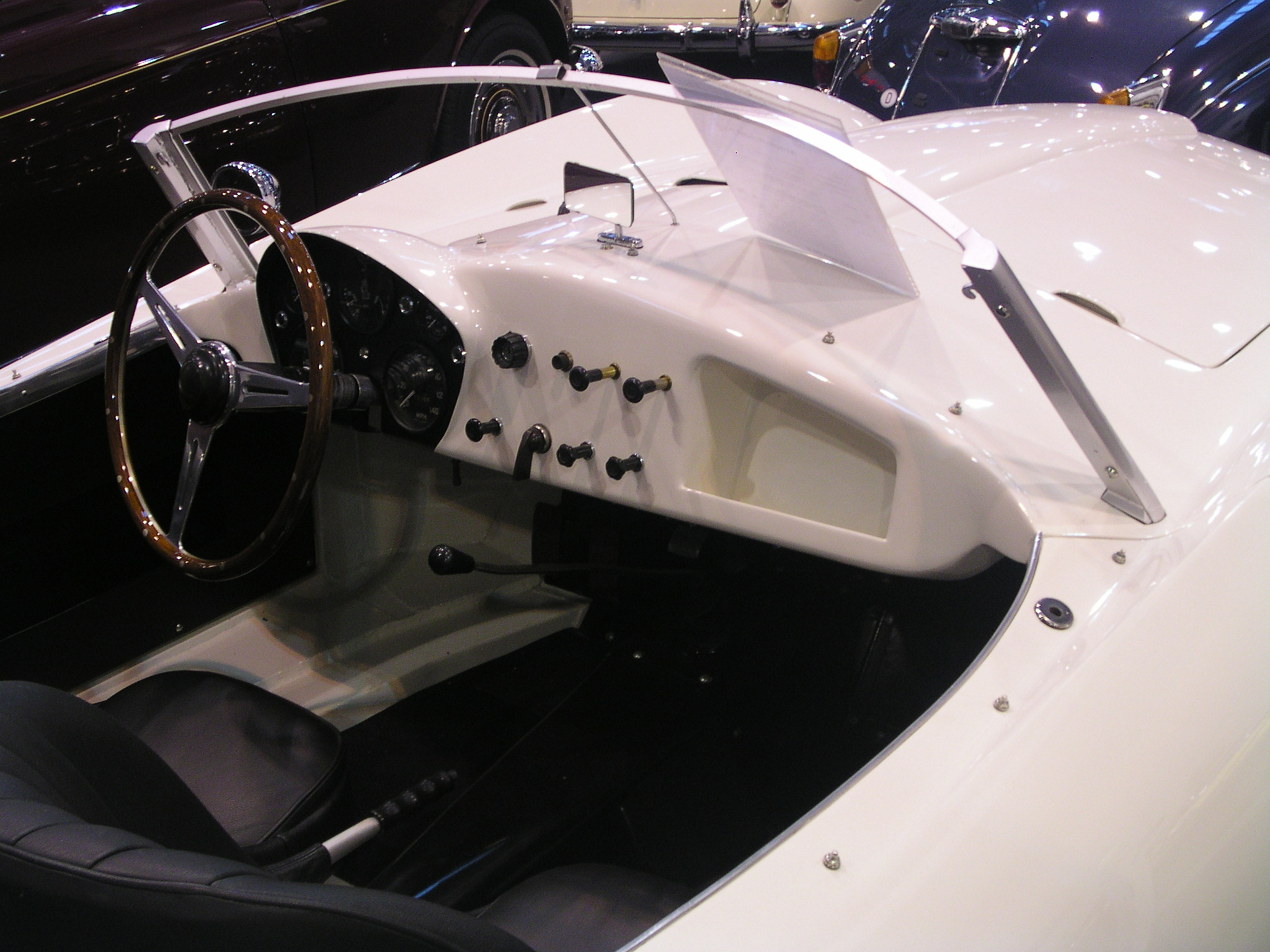 Arnolt Bristol deluxe, gesehen bei der Technoclassica in Essen 2005. Der 1958 in Stahlblech-Leichtbauweise auf einem Bristol 404-Chassis gebaute Roadster ist von Bertone entworfen. 6 Zylinder, 3 Vergaser, 1971 cm³ Hubraum, 4 Gänge. Von den 142 gebauten Fahrzeugen sollen noch ~ 60 existieren, dieses wurde für 115.000 € angeboten